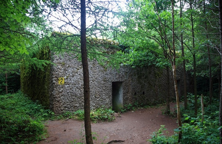 Kwatera Naczelnego Dowództwa Wojsk Lądowych (OKH) w Mamerkach, woj. warmińsko-mazurskie, powiat węgorzewski, gmina Węgorzewo.